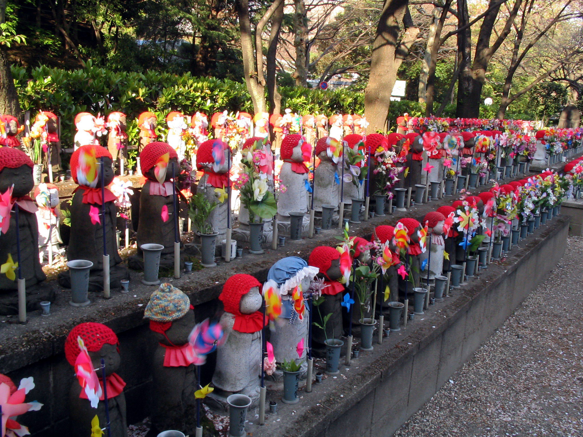 Jizo-Statues at a cemetery, Zojoji-Temple, Minato-ku, Tokyo.